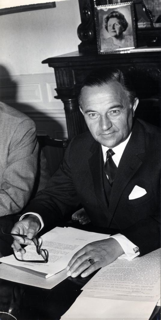 Jong, P.J.S. de (KVP). Minister De Jong legt een verklaring af na een ministerberaad over de situatie rond de invasie in Tsjecho-Slowakije. Nederland, Den Haag, 21 augustus 1968.